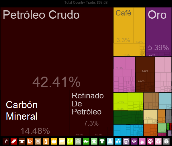 Colombia no exporta briquetas de carbón. Solamente carbón mineral y por ende se hace la corrección de la terminología.